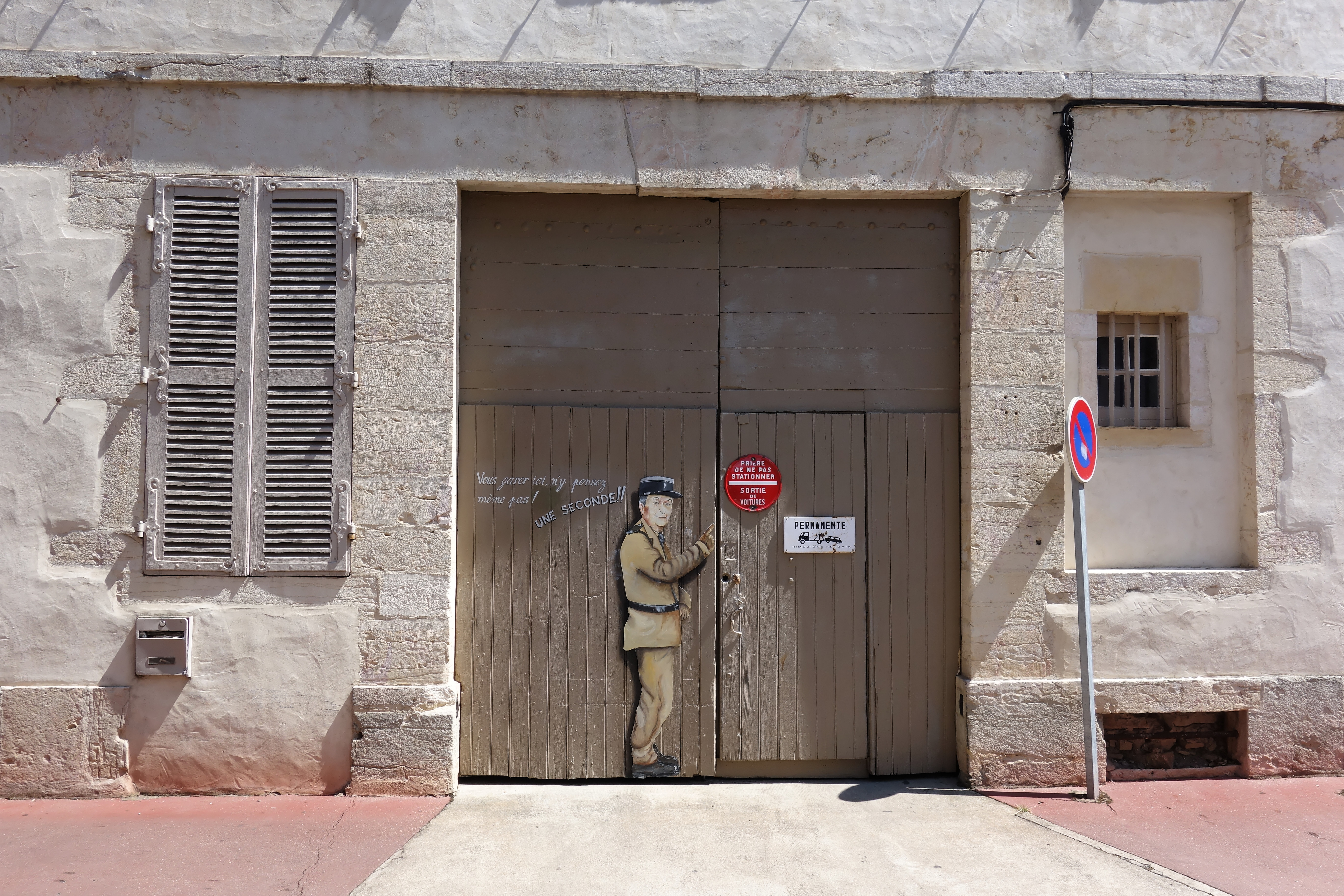 Un panneau d'interdiction de stationner avec une peinture murale représentant le gendarme de Saint-Tropez, à Beaune.